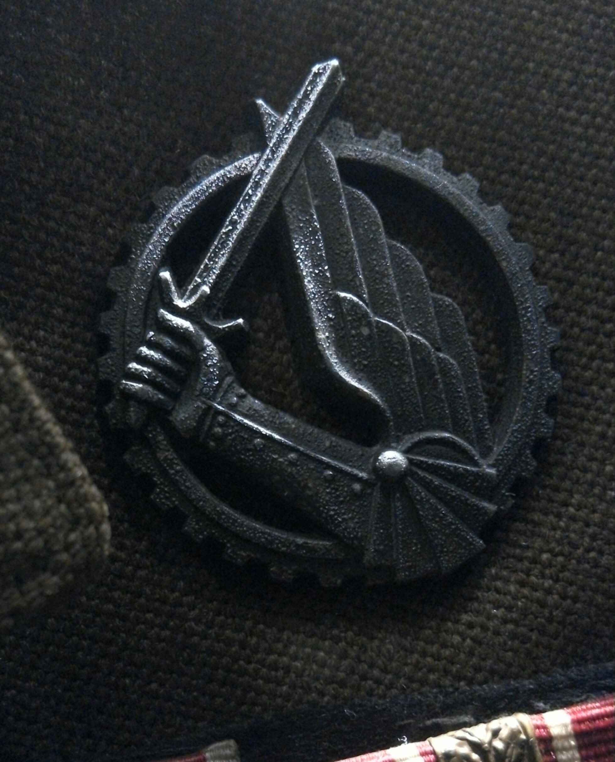 Znaczek pancerny